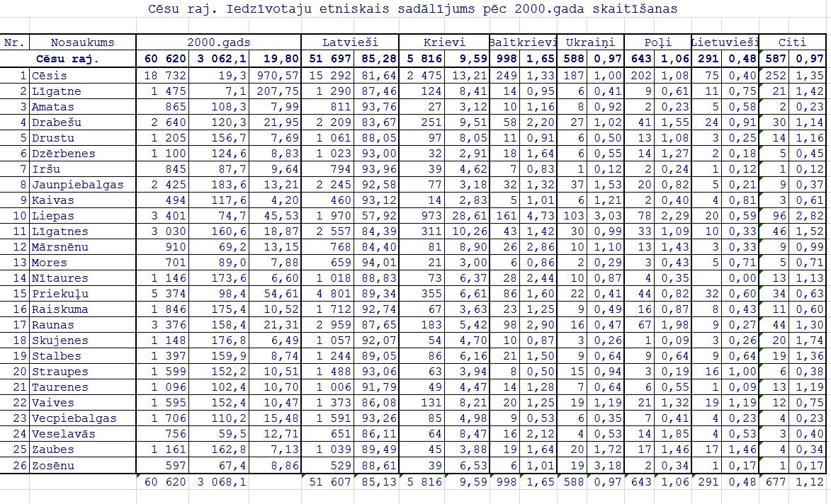 результаты переписи населения Латвии ни 01.04.2000